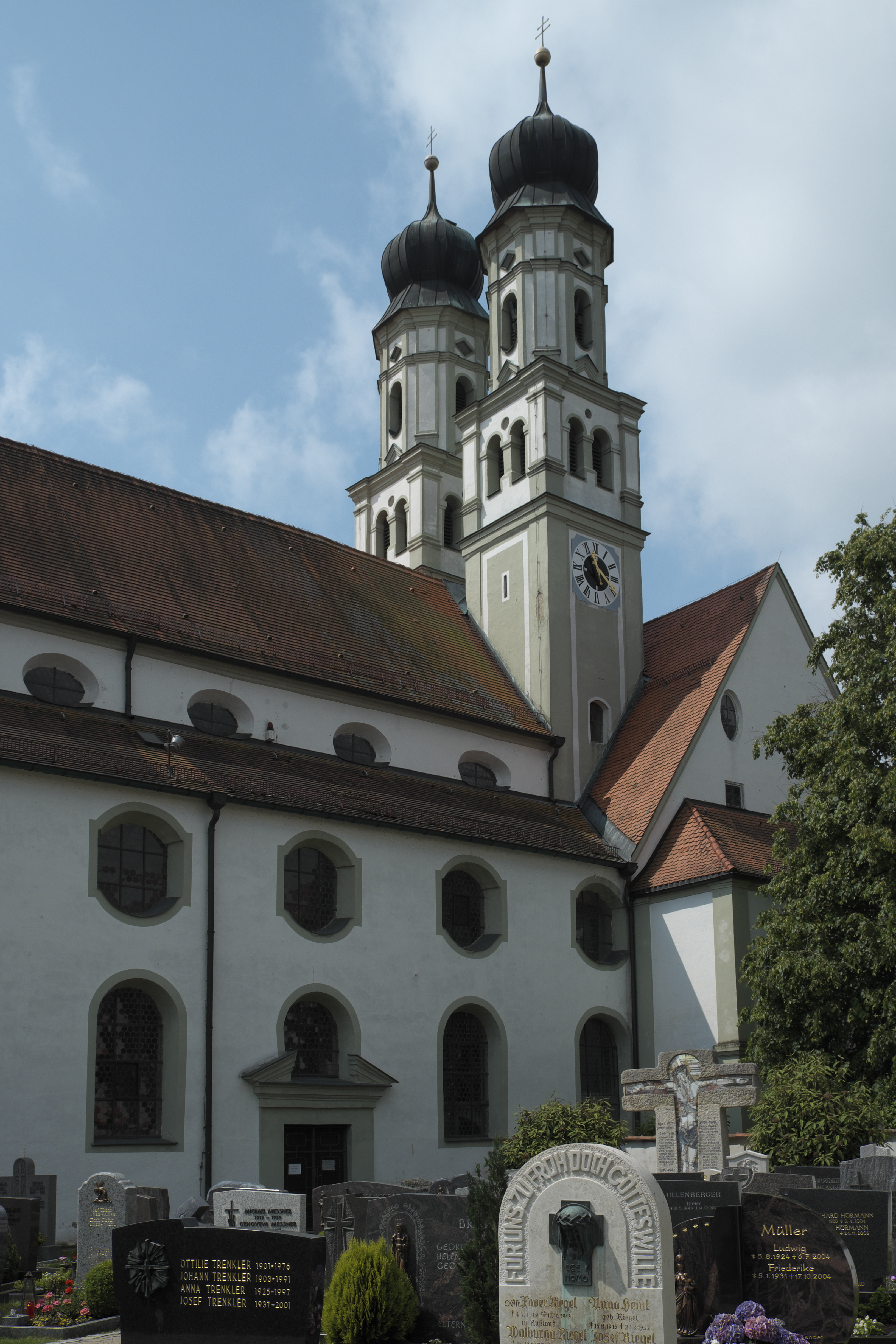 Katholische Pfarrkirche Mariä Himmelfahrt, ehemalige Klosterkirche des Zisterzienserinnenklosters Niederschönenfeld im Landkreis Donau-Ries (Bayern), von 1659 bis 1662 Wiederaufbau durch Konstantin Pader, Doppeltürme mit Zwiebelhaube